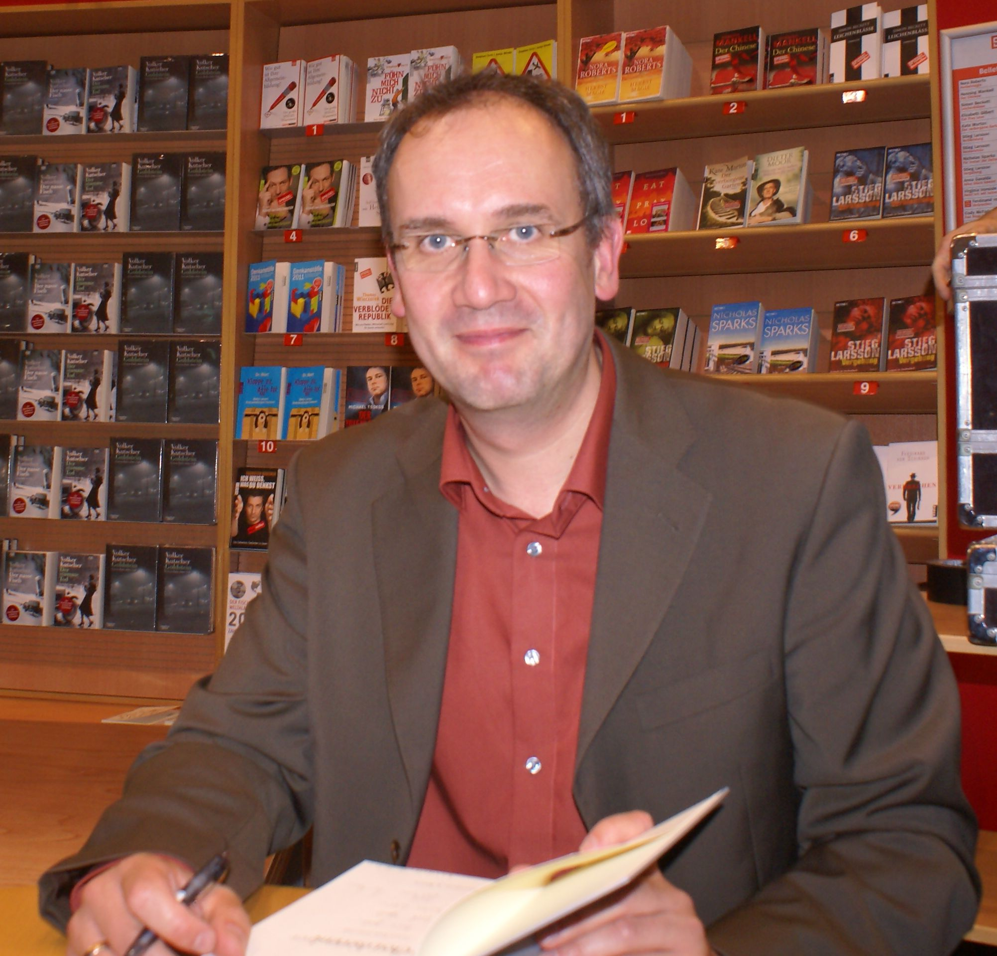 Volker Kutscher bei einer Lesung in Bielefeld am 30.September 2010